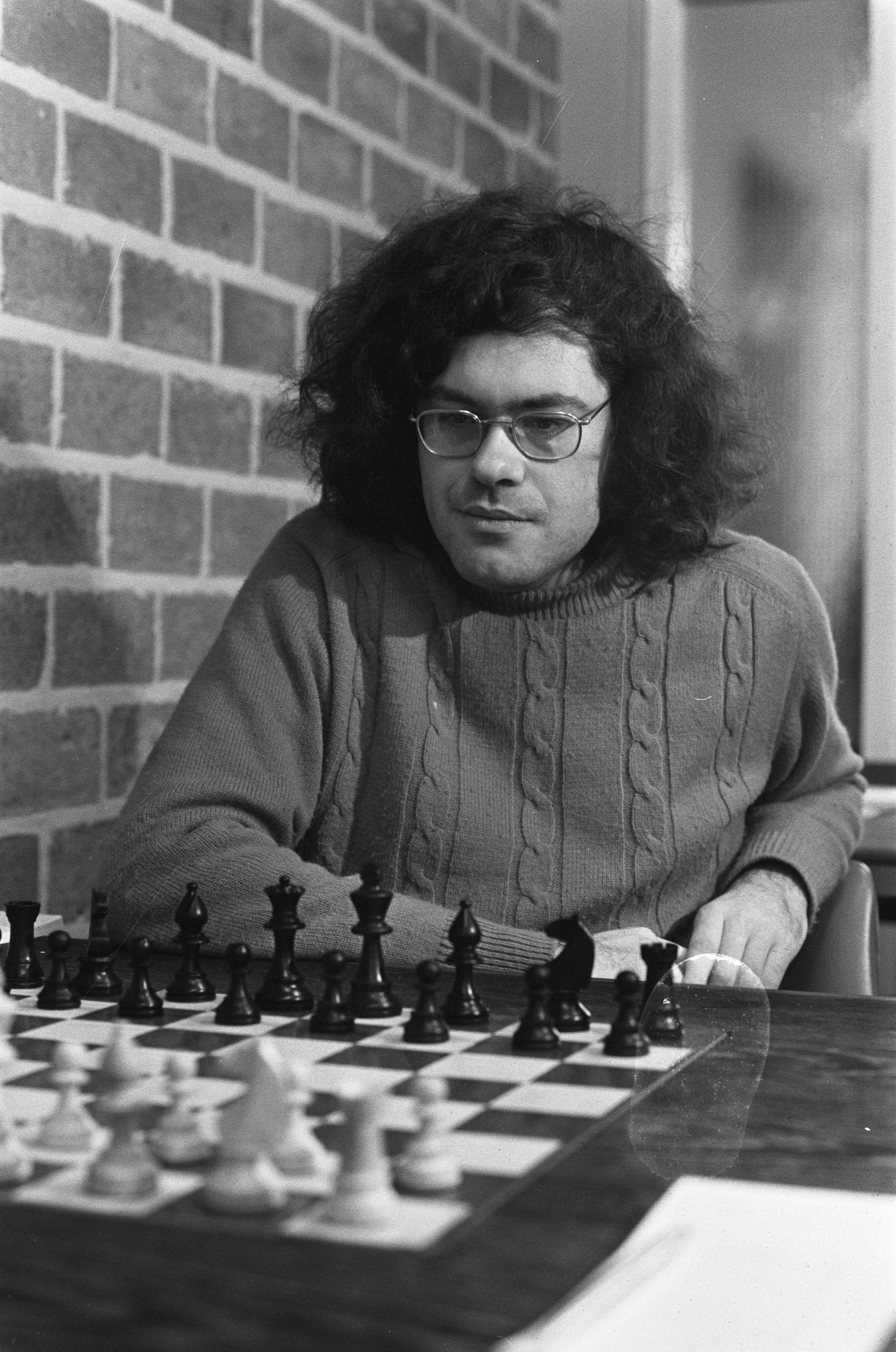 Hoogoven-schaaktoernooi te Wijk aan Zee 1973, Hans Ree.